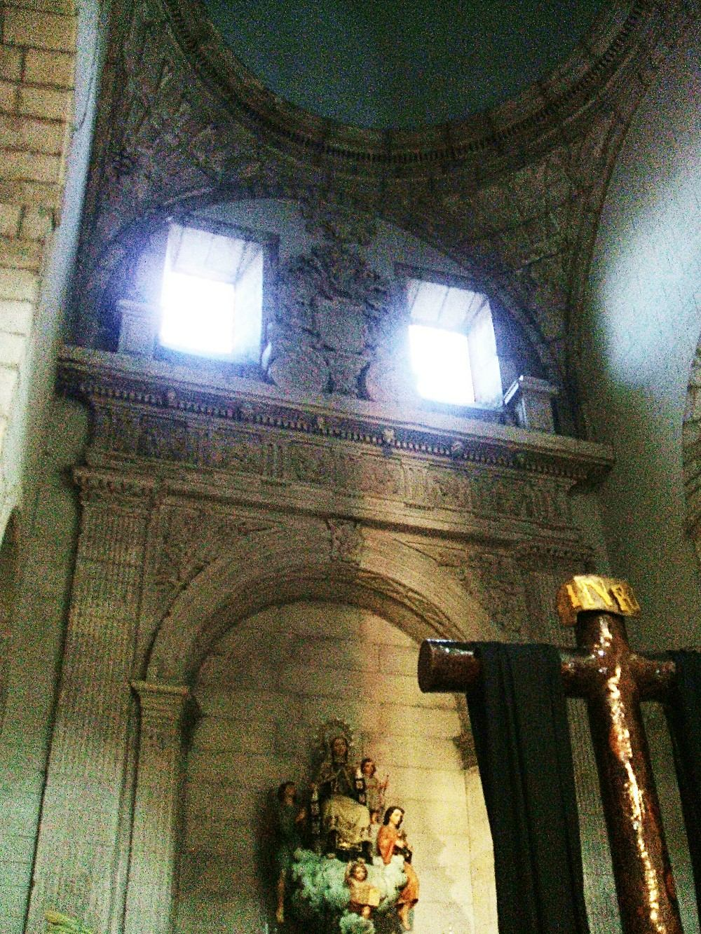 Capilla renacentista del Carmen, en la iglesia de San Vicente Mártir, Vitoria-Gasteiz, España/Spain